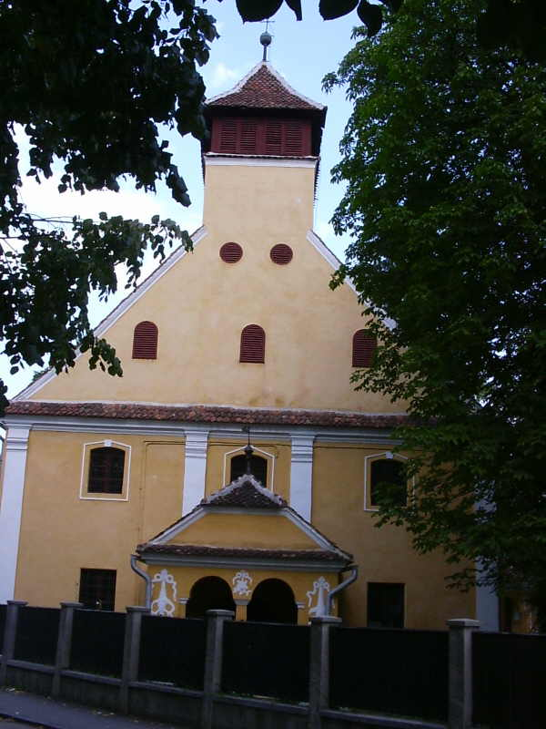 saxon lutheran church in Blumăna/Blumenau